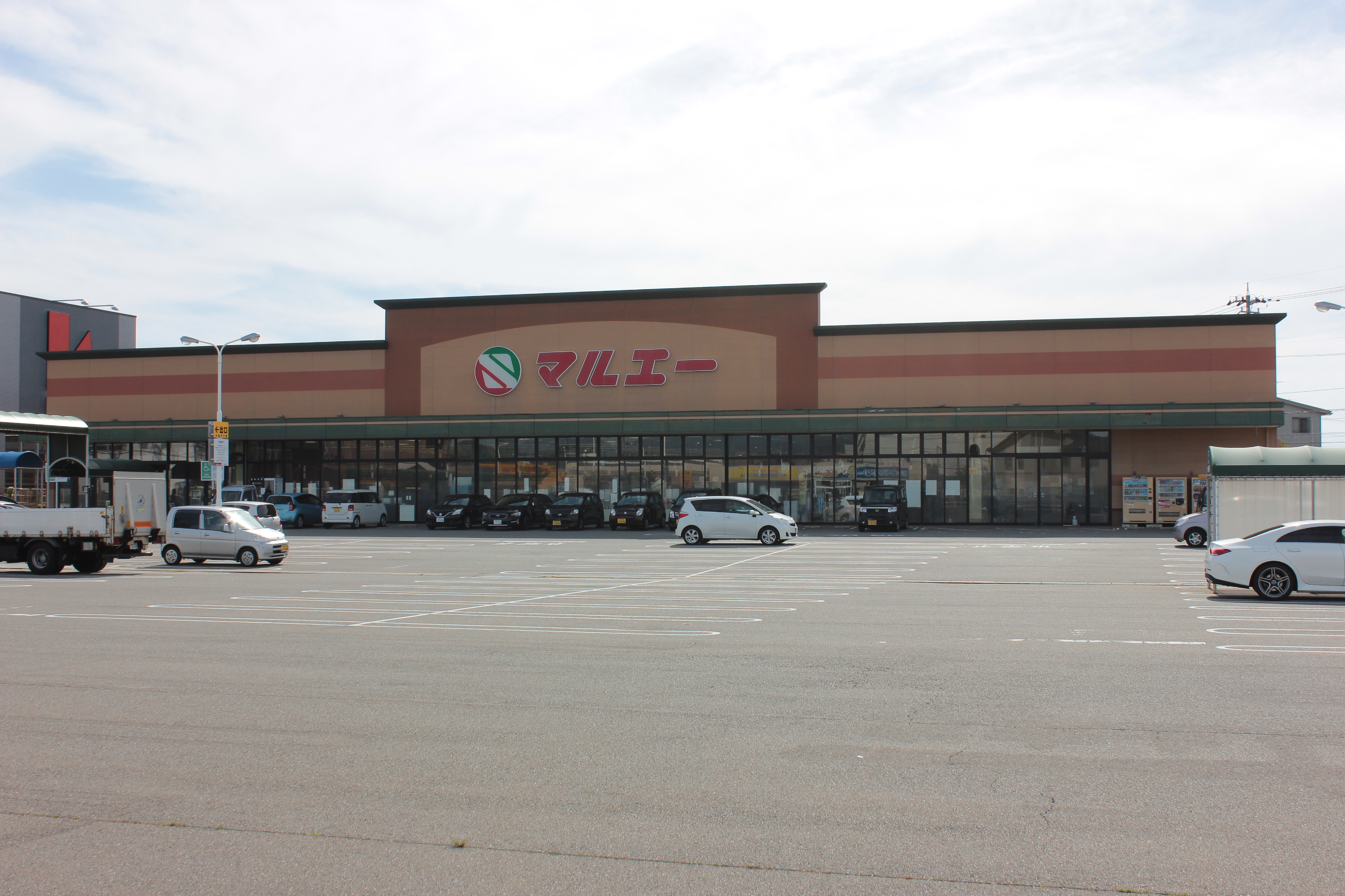 マルエー二日市店（石川県野々市市） Canon EOS Kiss X5